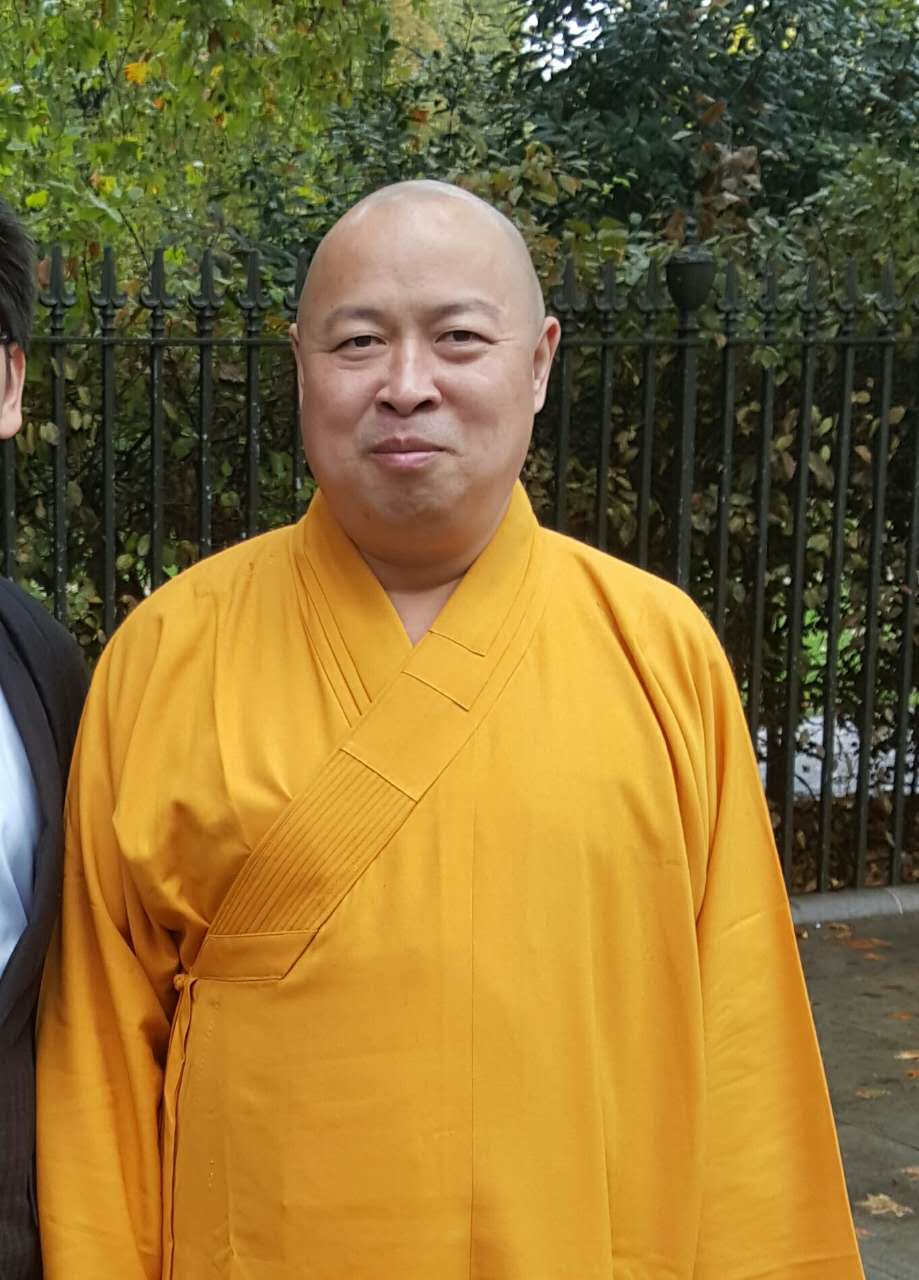 daheshang lodon